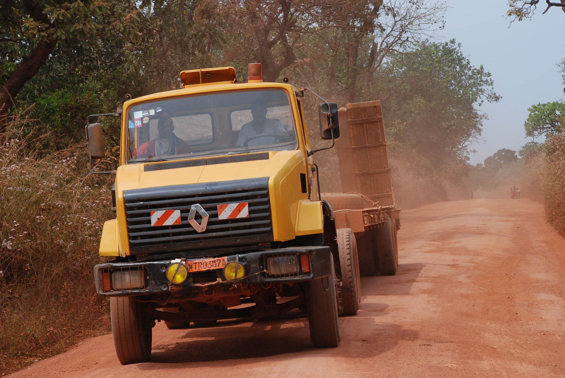 Camion grumier à vide dans la localité de Yokadouma à l'Est du Cameroun This is an image with the theme "Africa on the Move or Transport" from: Cameroon